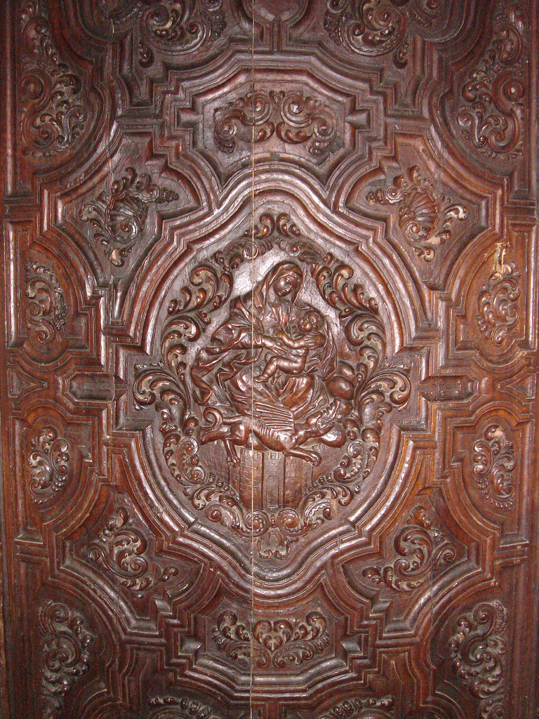 Catedral de Jaén